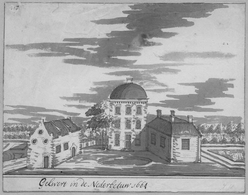 Naar een onbekend voorbeeld of gefantaseerd tekening.